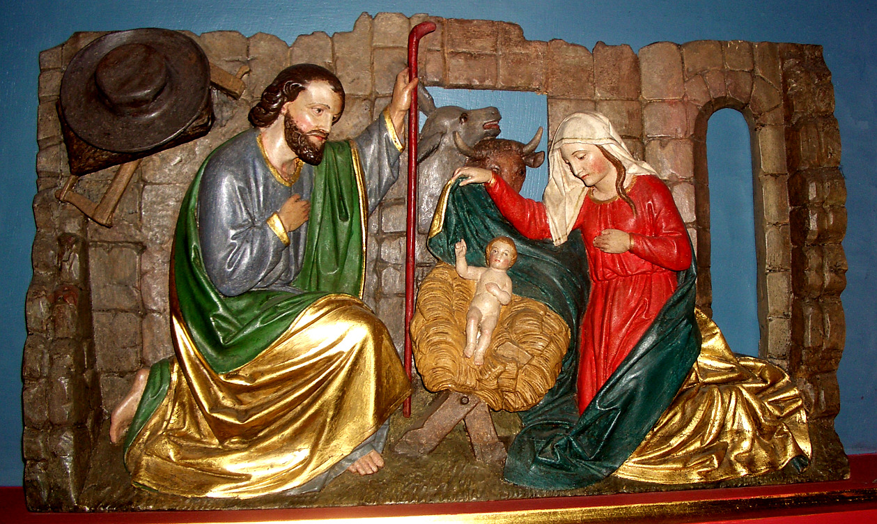 Friedrichshafen, Germany: Katholische Kirche Ailingen, Krippendarstellung des Ailinger Künstlers Lauer